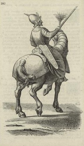 Costumes anciens et modernes by Cesare Vecellio (ca. 1521-1601)